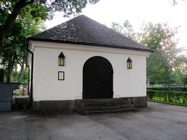 Mikaelikyrkan, Arvika, Diocese of Karlstad, Sweden. Gravkapellet.